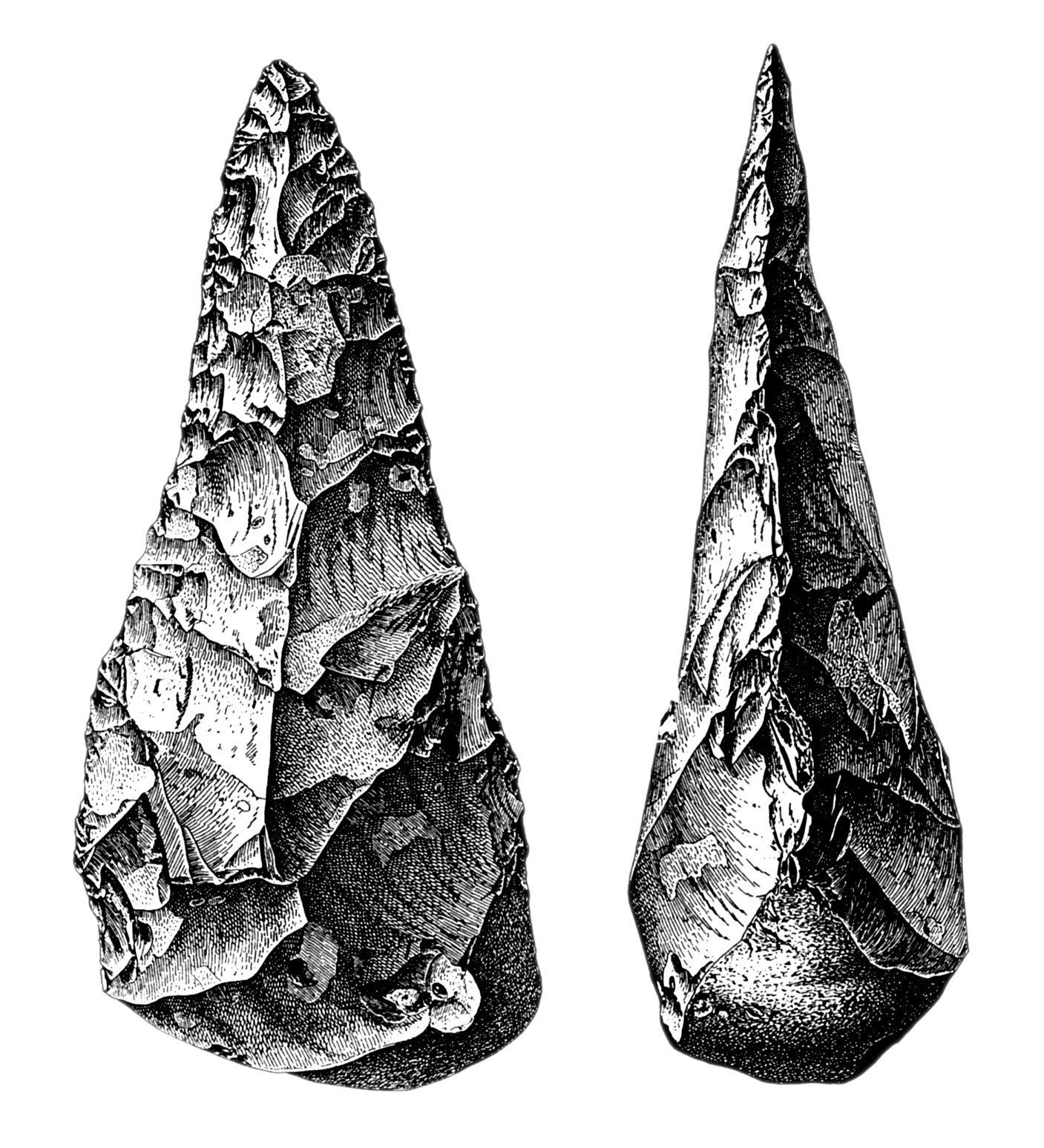 dessin de biface en silex de Saint-Acheul (Somme, France) - 20 cm de haut